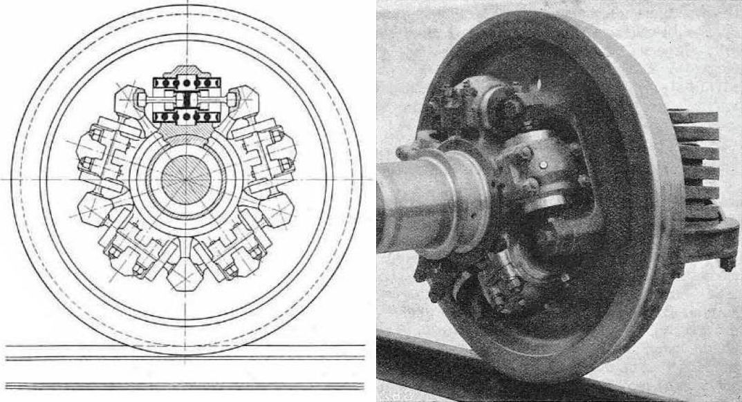 Beim Sécheron-Federantrieb drücken die Federtöpfe unter Zwischenschaltung von Stösseln mit sphärischen Enden entweder auf einen besonderen auf die Triebradachse aufgezogenen Mitnehmerstern (Abb.) oder unmittelbar auf die entsprechend ausgebildeten Radspeichen. Wenn die Berührungsflächen zwischen den Stösseln und den entsprechend ausgebildeten Pfannen im Mitnehmer, bzw. an den Radspeichen ohne zu gleiten auf einander abrollen, sollte keine Schmierung nötig sein. Der SAAS-Antrieb wurde erstmals beim Dreiwagenzug Re 8/12 502 sowie bei Triebwagen und Triebwagenzügen der BLS-Gruppe eingesetzt.